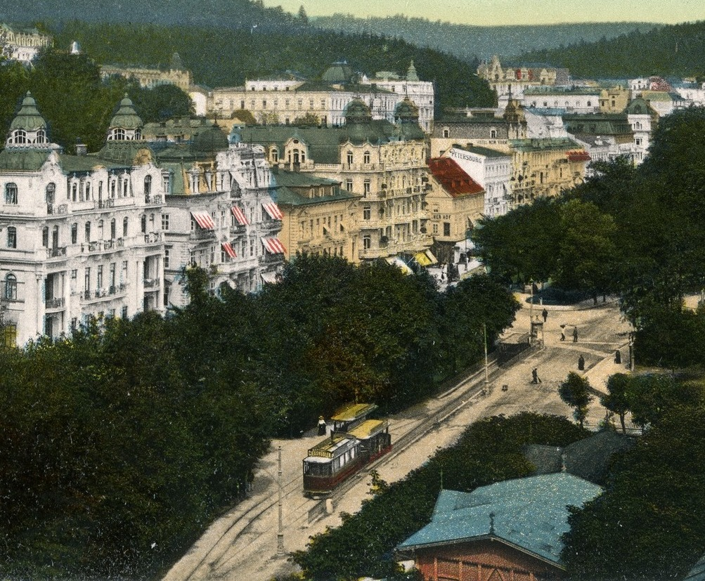 Marienbad; Kaiserstraße This postcard is from publisher Brück & Sohn in Meißen ( This postcard has a unique number 15295 and is available in a higher resolution at the publisher. This images was uploaded in a cooperation project between Wikipedians and the publisher.